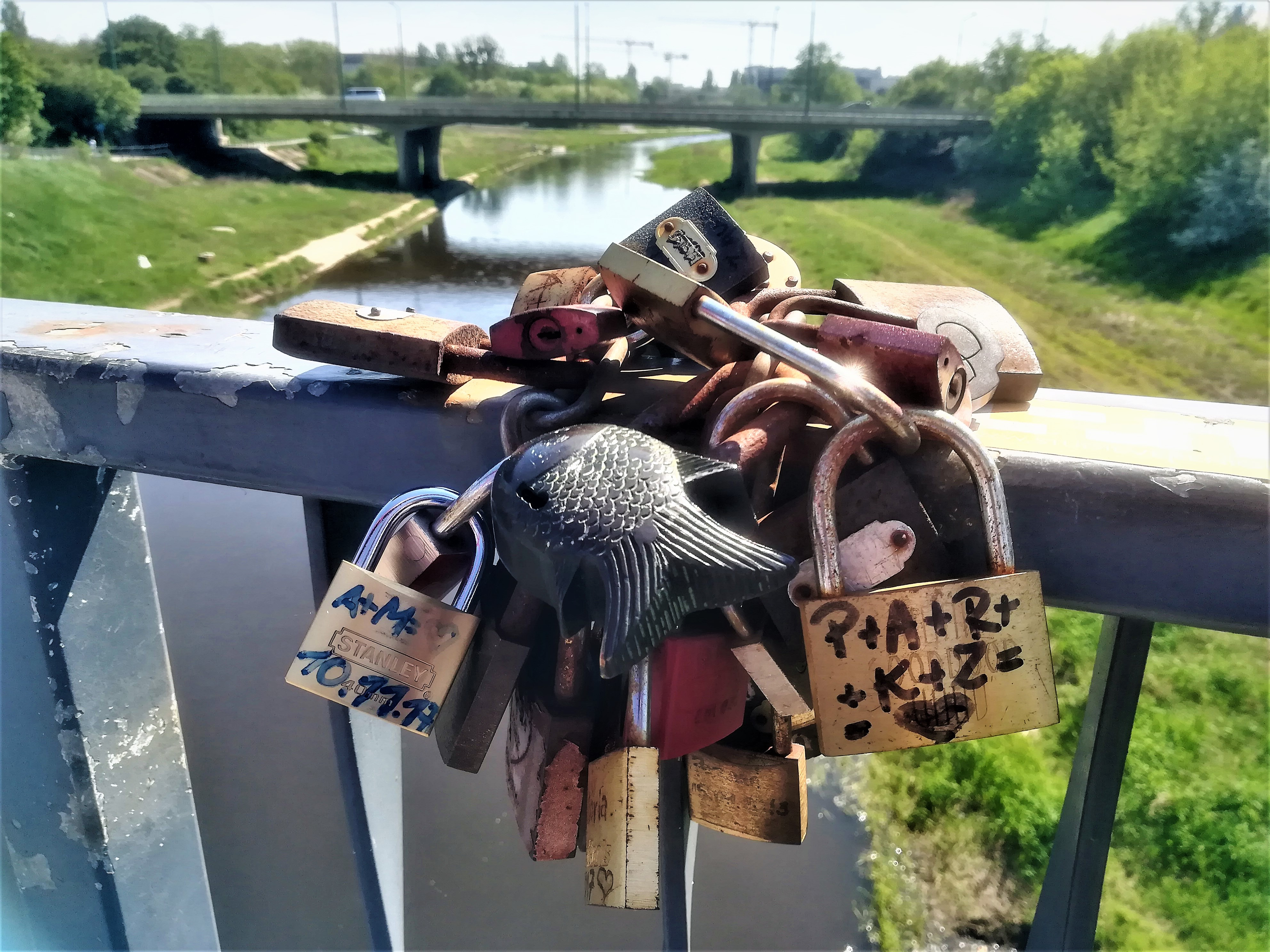 Kłódki miłości na moście Jordana w poznaniu.